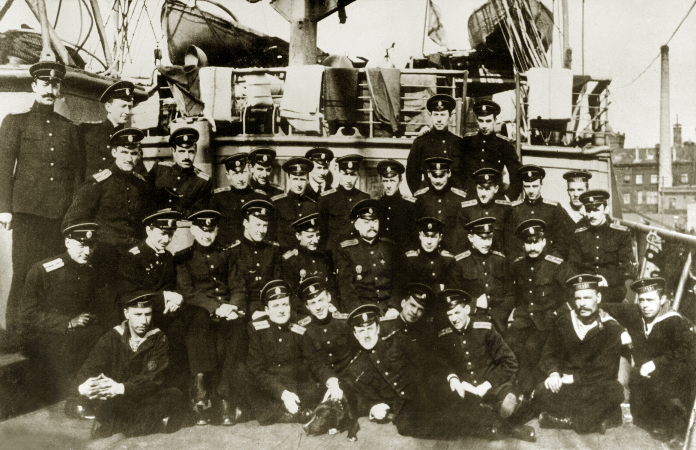 Выпуск Временного Штурманского офицерского класса, март 1917 г. Гельсингфорс, транспорт «Митава»